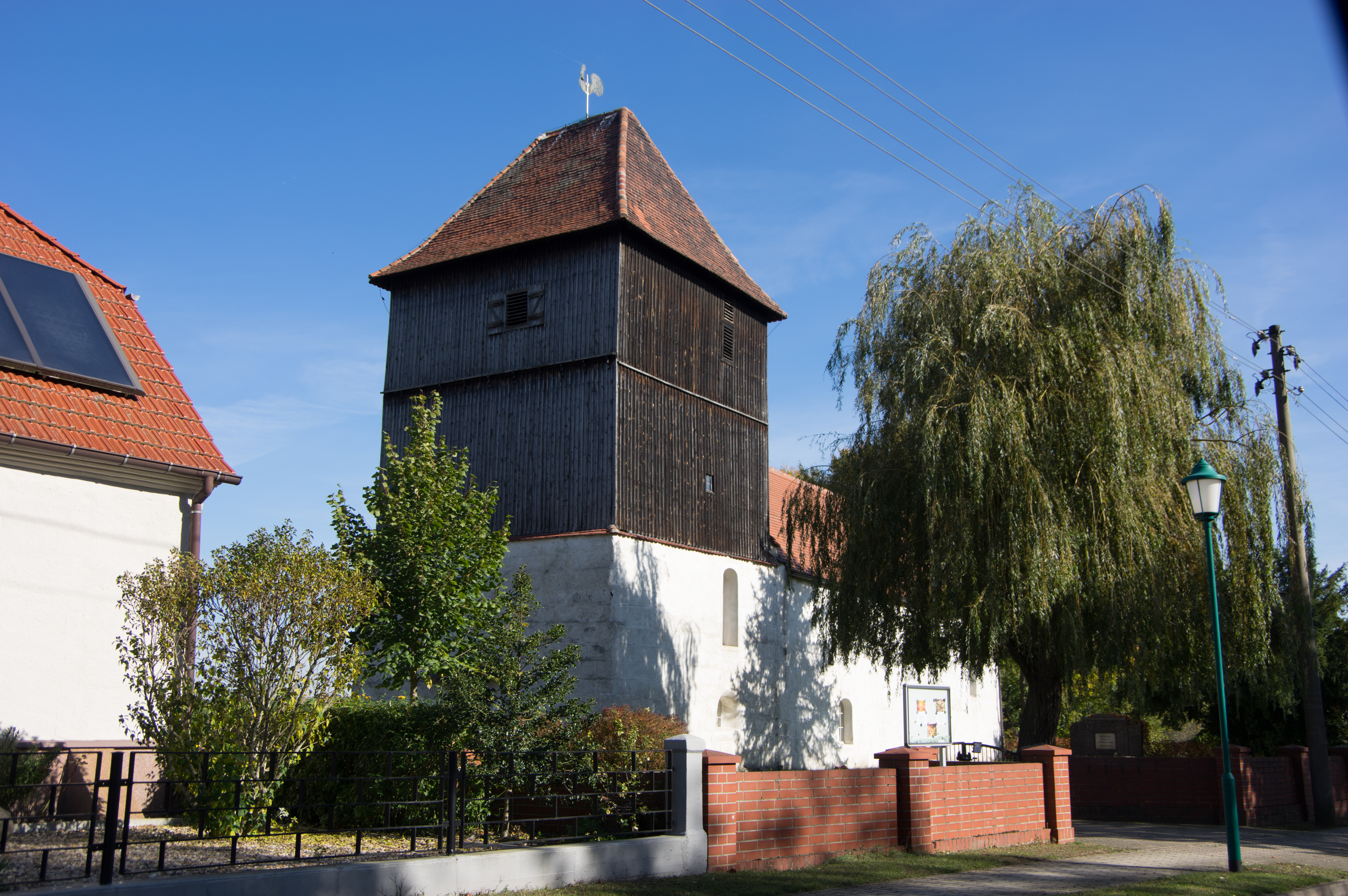 Kolochau ein Ortsteil von Kemitzaue in Brandenburg. Die denkmalgeschützte Kirche.